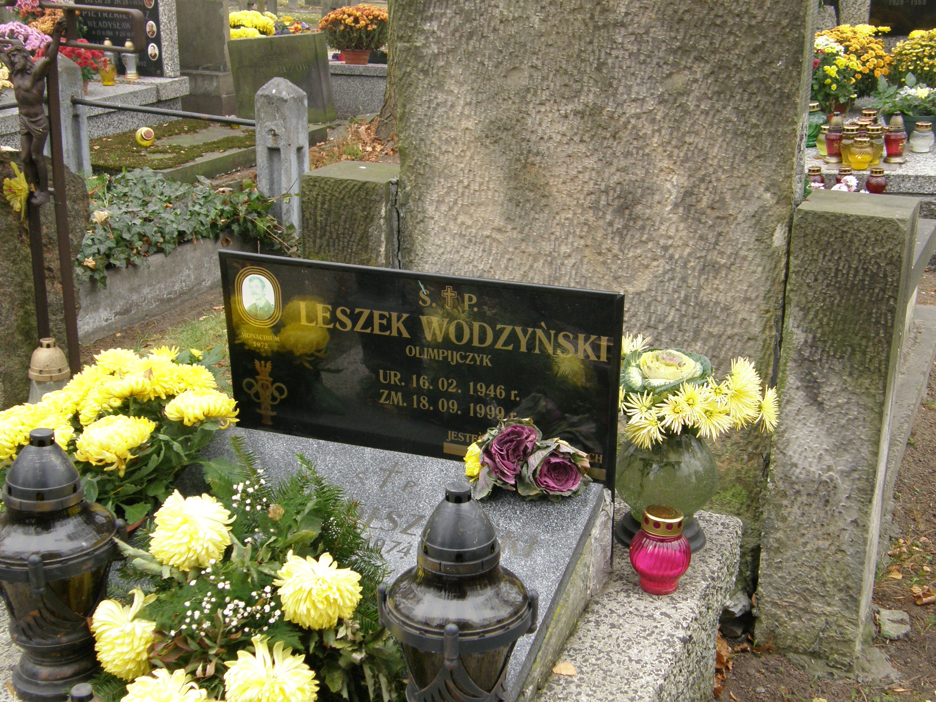 Grób Leszka Wodzyńskiego - cmentarz wojskowy na Powązkach w Warszawie